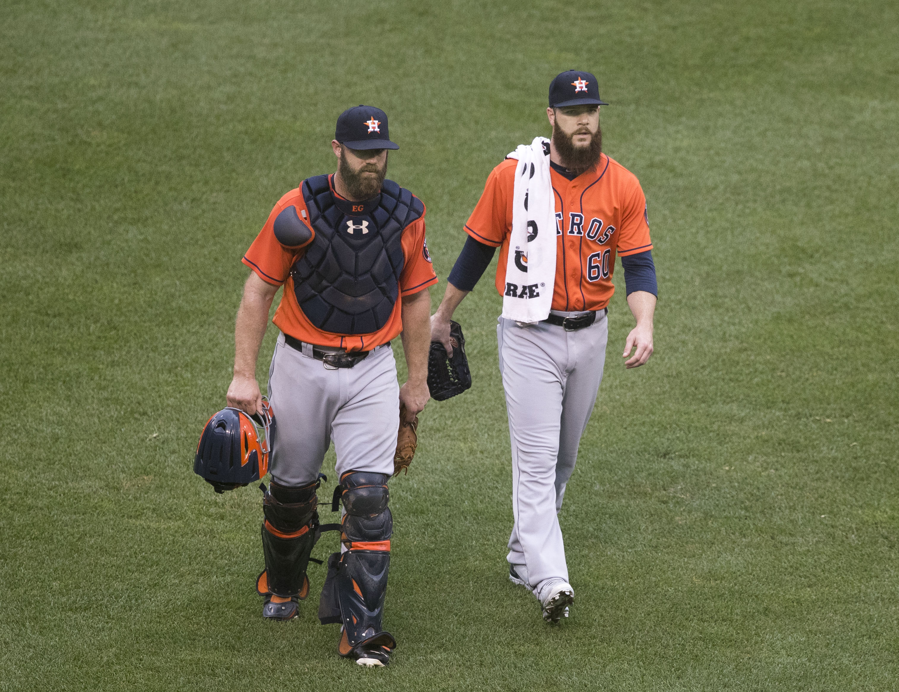 Evan Gattis (left) and Dallas Keuchel